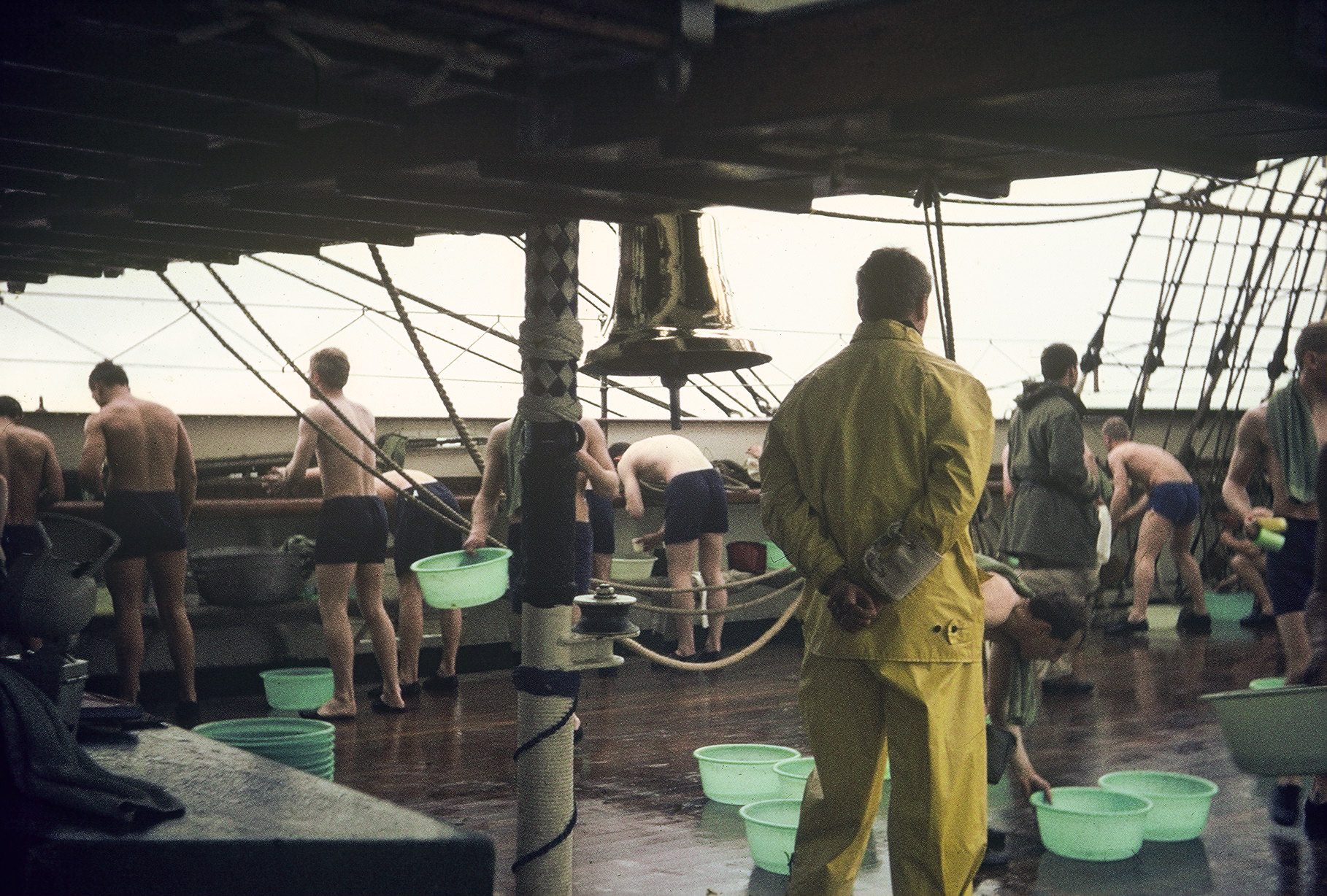 Morgenwäsche der Offizieranwärter auf der Gorch Fock (1958)